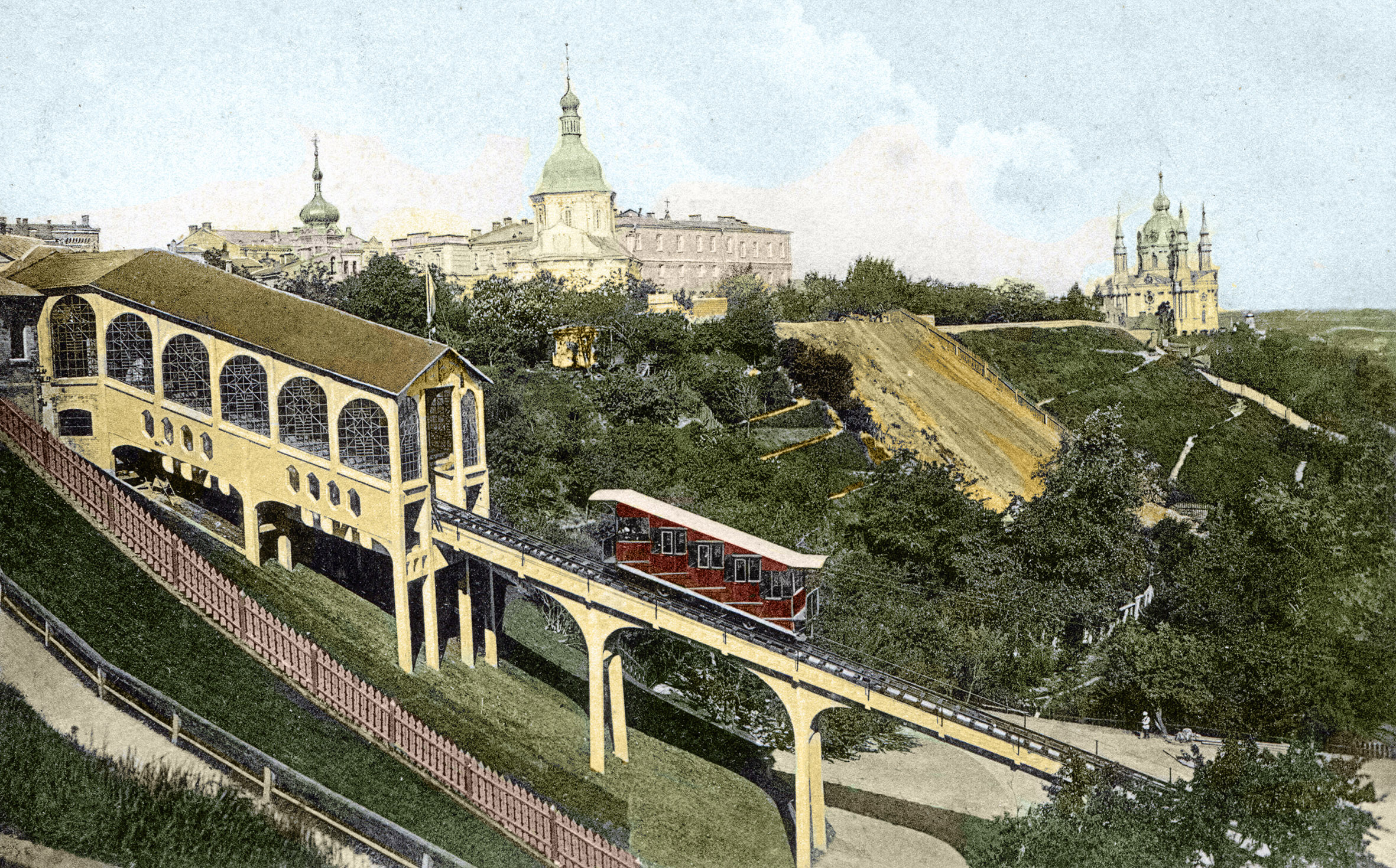 Фунікулер, Трьохсвятительська й Андріївська церкви